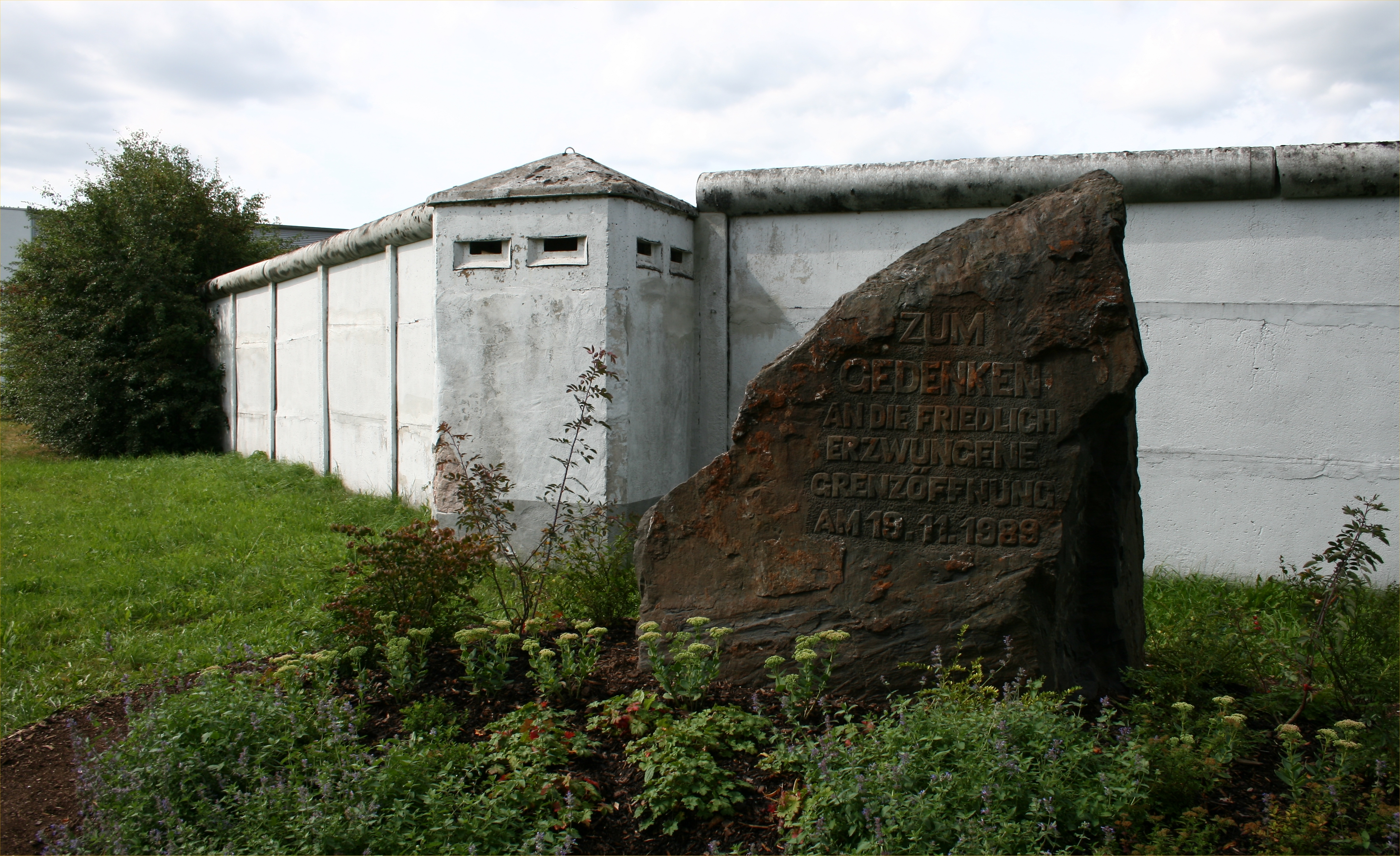 Heinersdorf (Judenbach) lag an der innerdeutschen Grenze und war durch eine Mauer vom bayerischen Welitsch getrennt. Ein Teil der Mauer wurde zum Gedenken erhalten